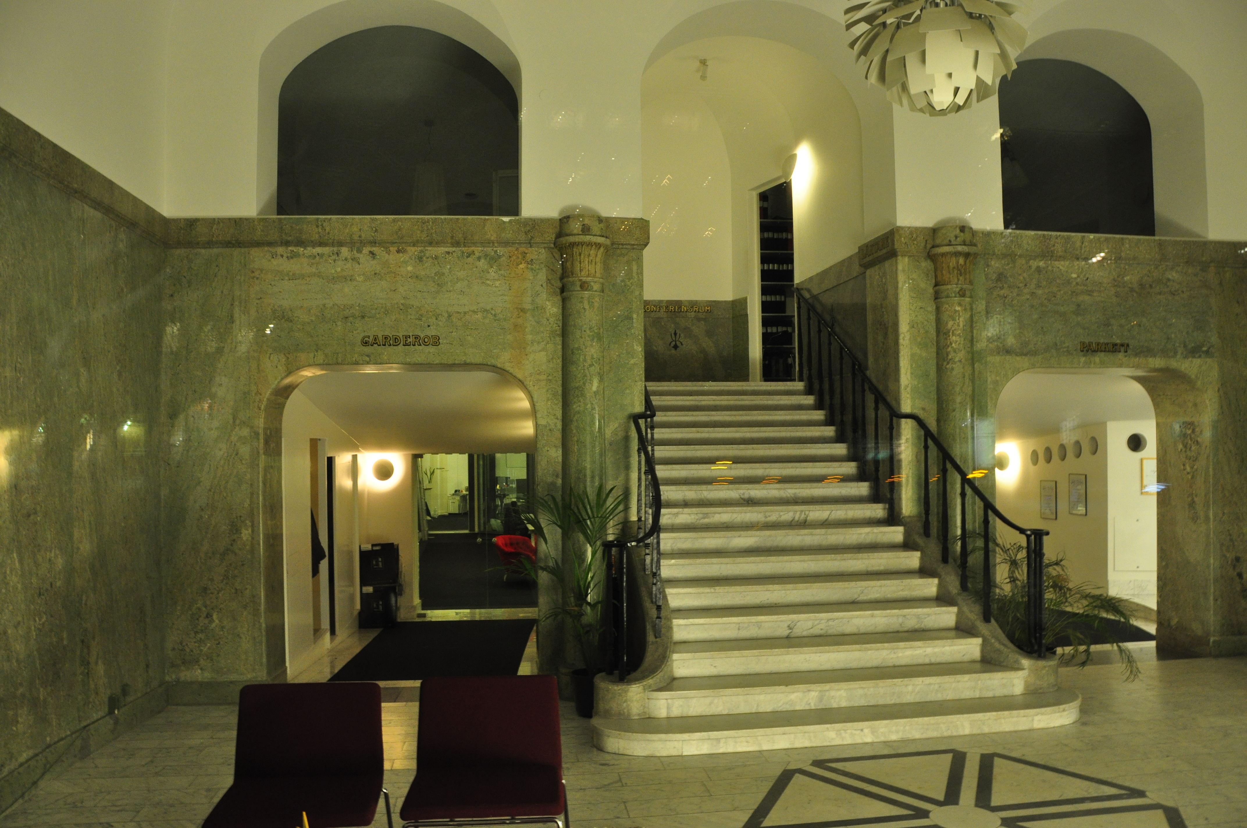 Tidigare Biograf Eriksberg. Birger Jarlsgatan 58, Stockholm